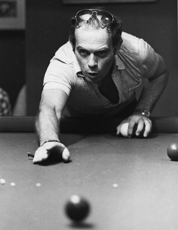 Il regista Pasquale Squitieri sul set.